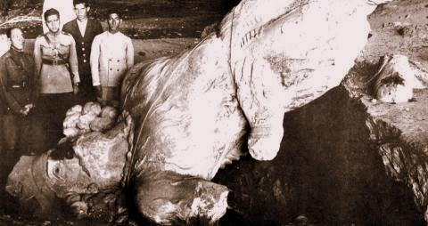 پیکره و تندیس شاپور ساسانی پیش از مرمت